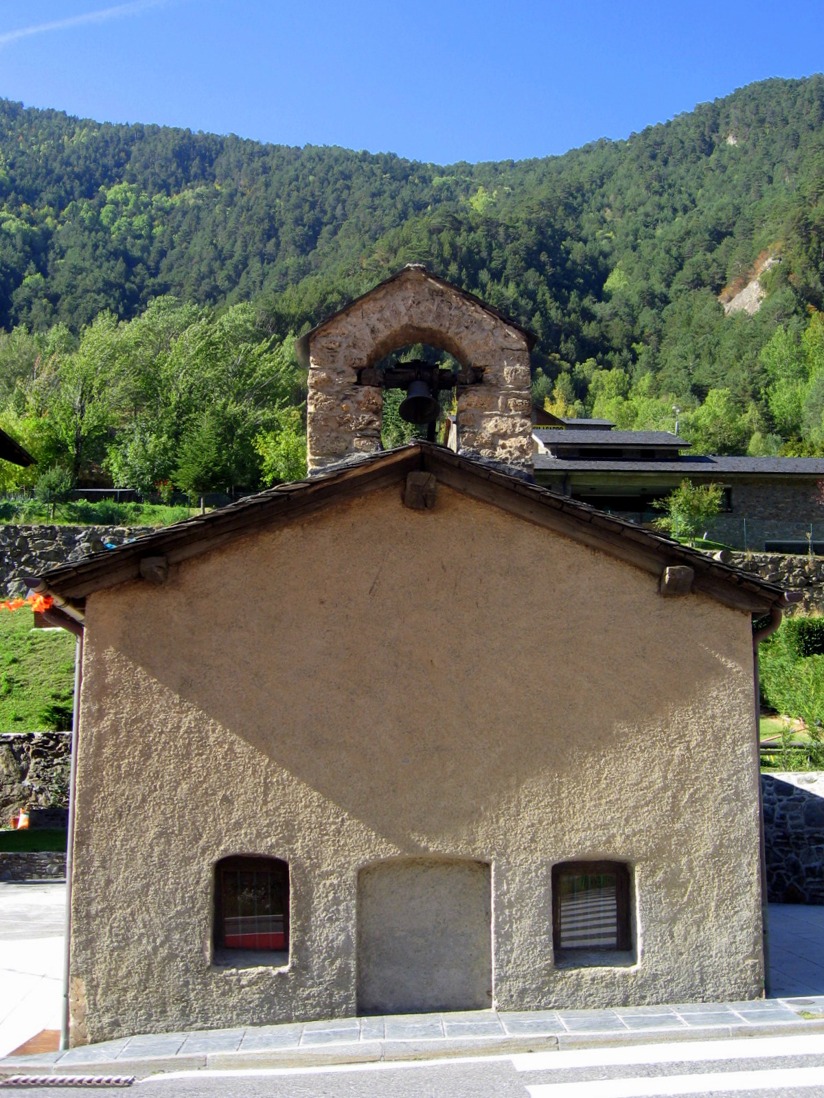 Cartell de l'església de Sant Miquel d'Ansalonga